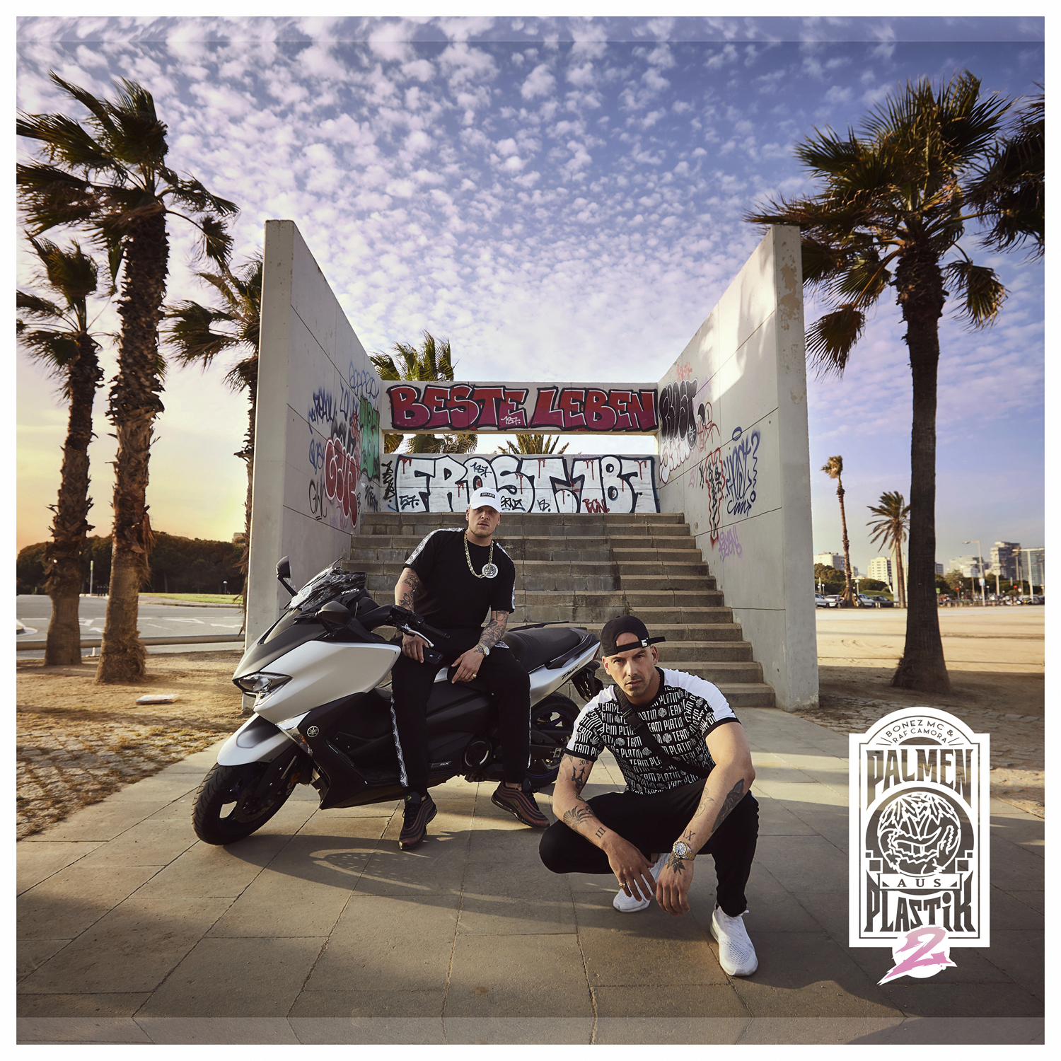 Photo by Pascal Kerouche